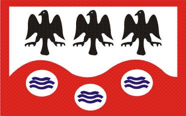 Bandeira do Município de Garanhuns